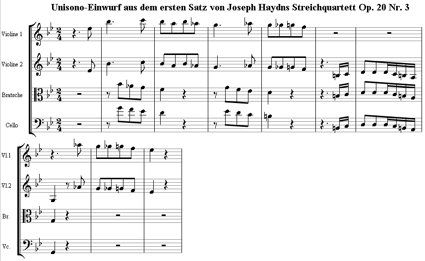 Beschreibung: Ausschnitt aus dem 1.Satz des Streichquartetts Op.20 Nr.3 von Joseph Haydn *Quelle: Joseph Haydn, gezeichnet von Boris Fernbacher Boris Fernbacher 11:45, 17. Jan 2006 (CET) Fotograf / Zeichner: Andere Versionen: Lizenz des Notenbilds